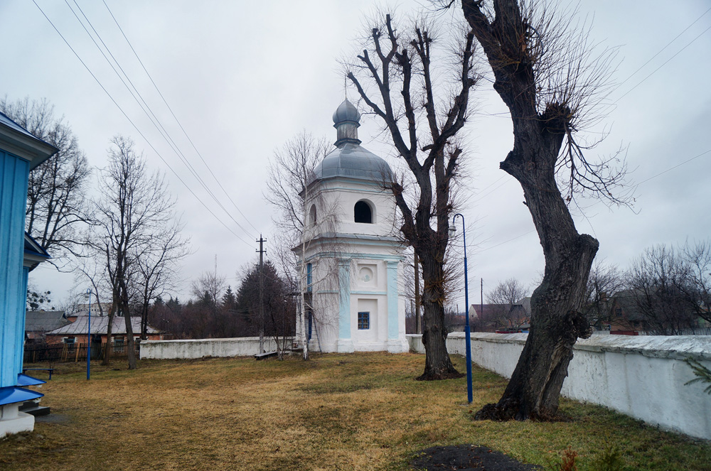 Дзвіниця Різдвяно-Богородничої церкви у місті Іллінці.